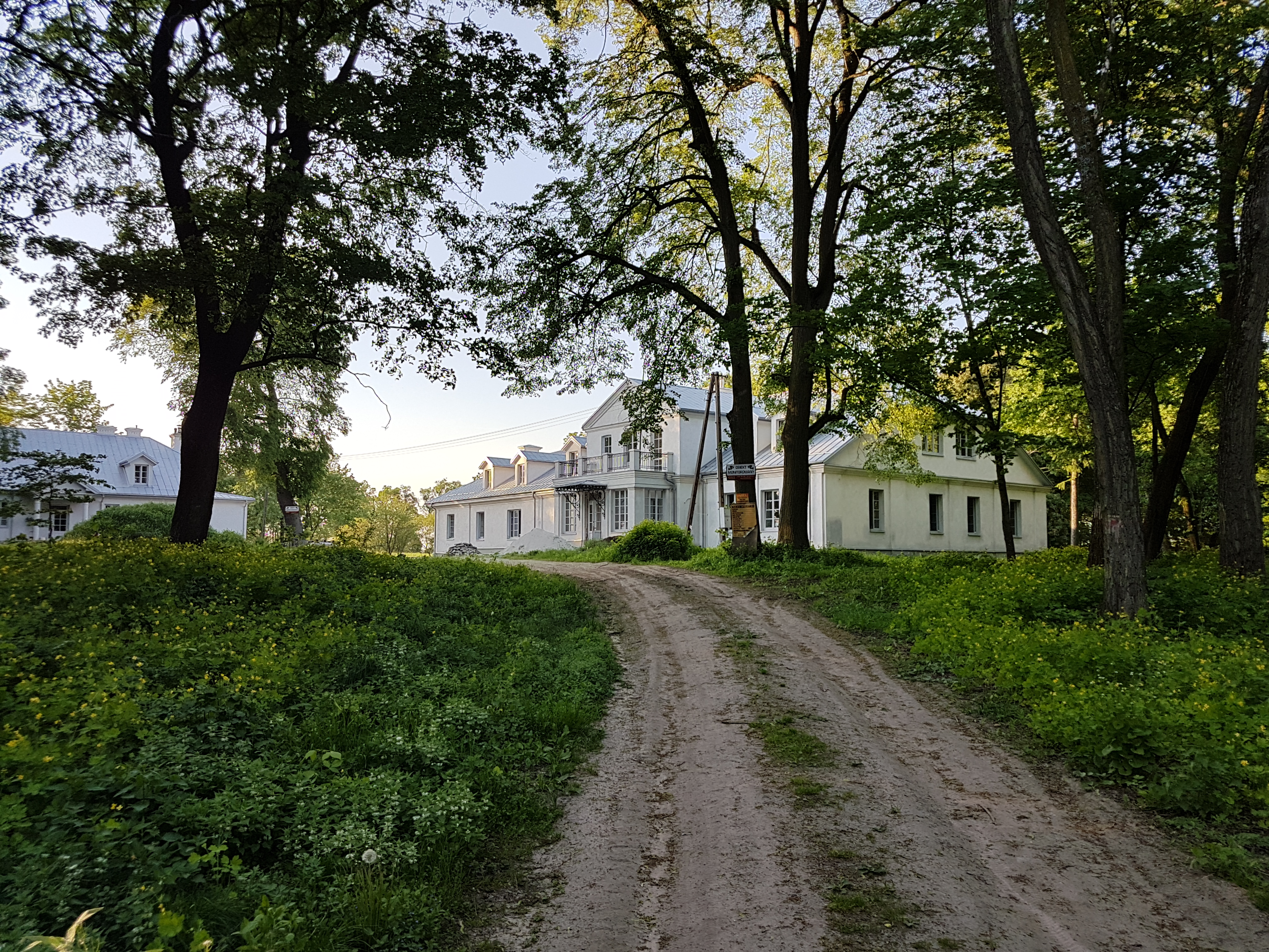 Dworek w Wilczyskach po renowacji.